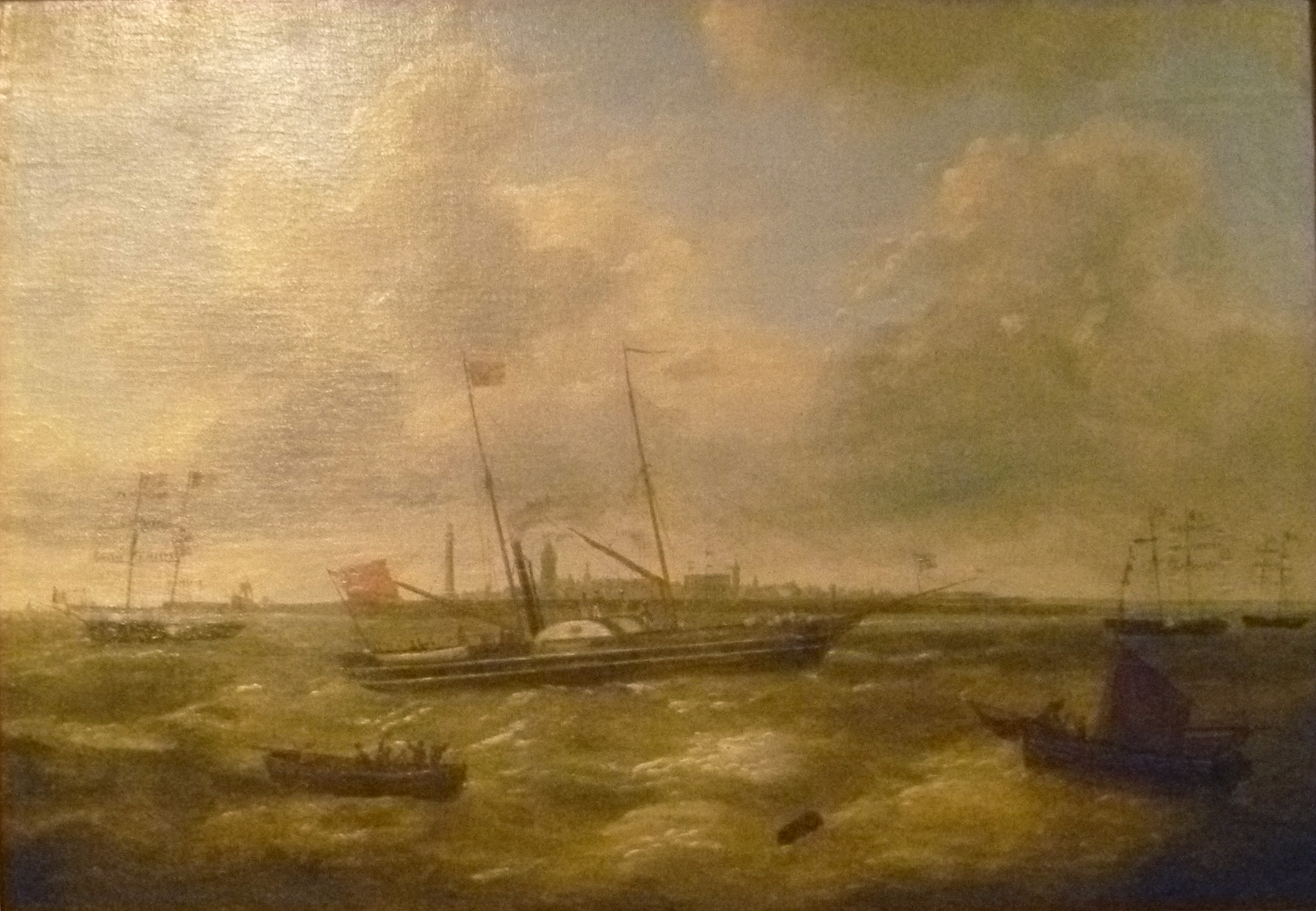 "Aankomst van het zeiljacht van koningin Victoria in Oostende, 1843" olieverf op doek door de Belgische kunstschilder Louis Verboeckhoven (1802–1889); Collectie Stad Oostende in MuZee